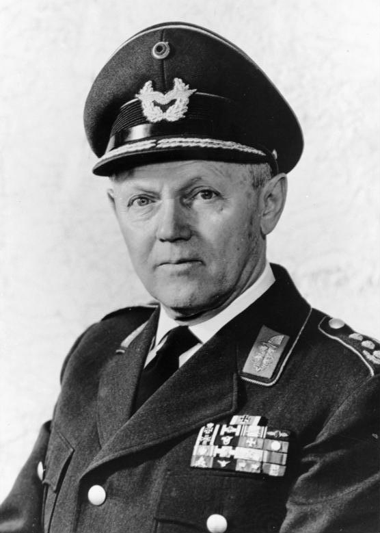 GL Kammhuber